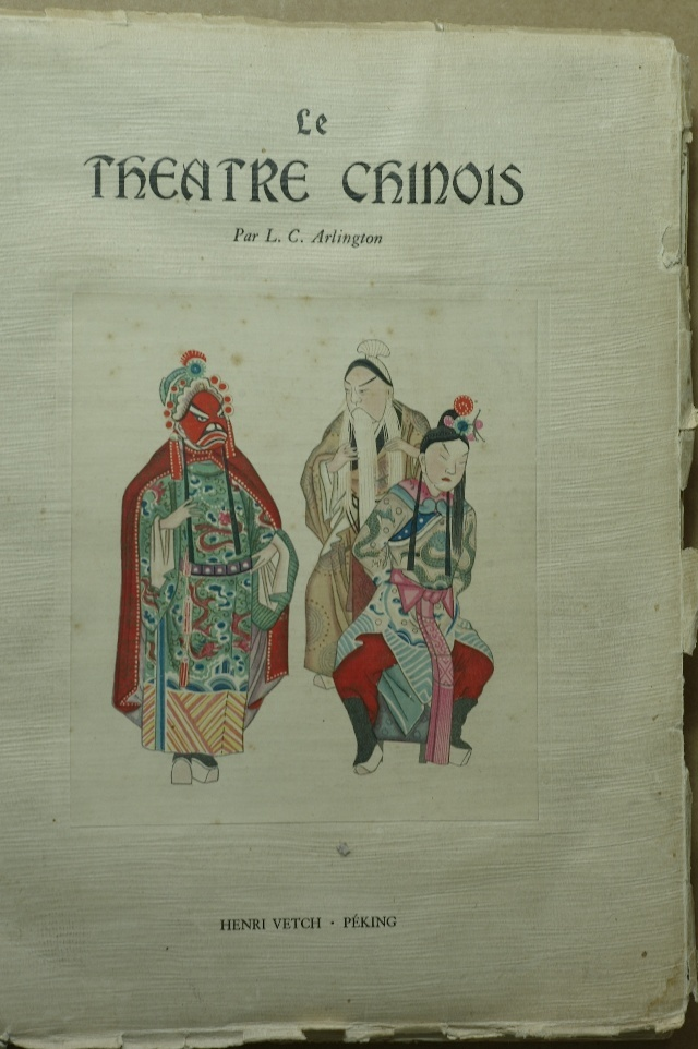 劉易斯·查爾斯·阿靈頓著《中國戲劇史》法文版封面